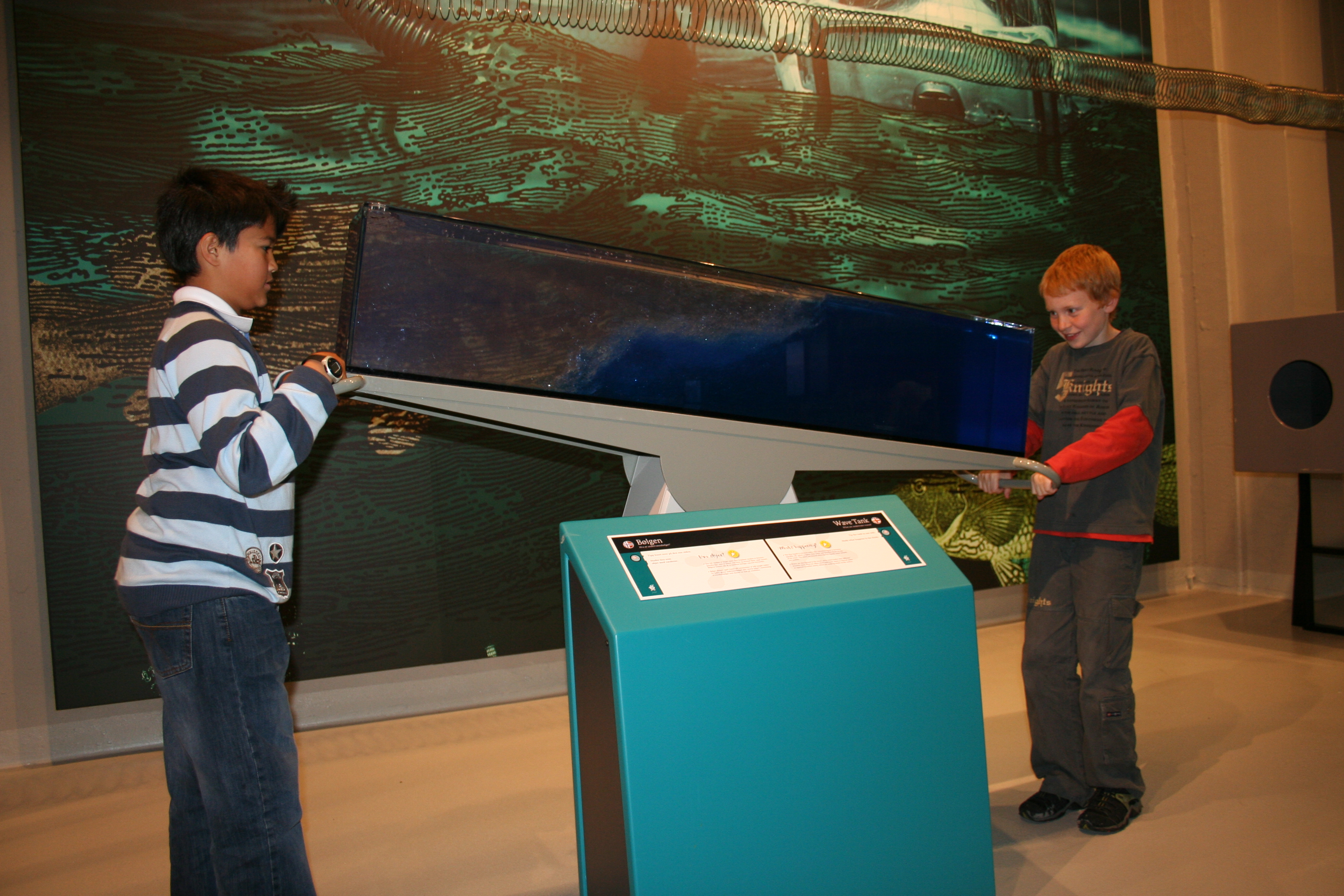 Wave tank, Bergen Science Centre.